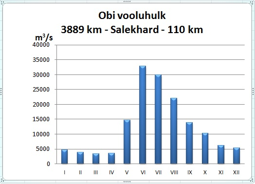 Obi jõe hüdrograaf